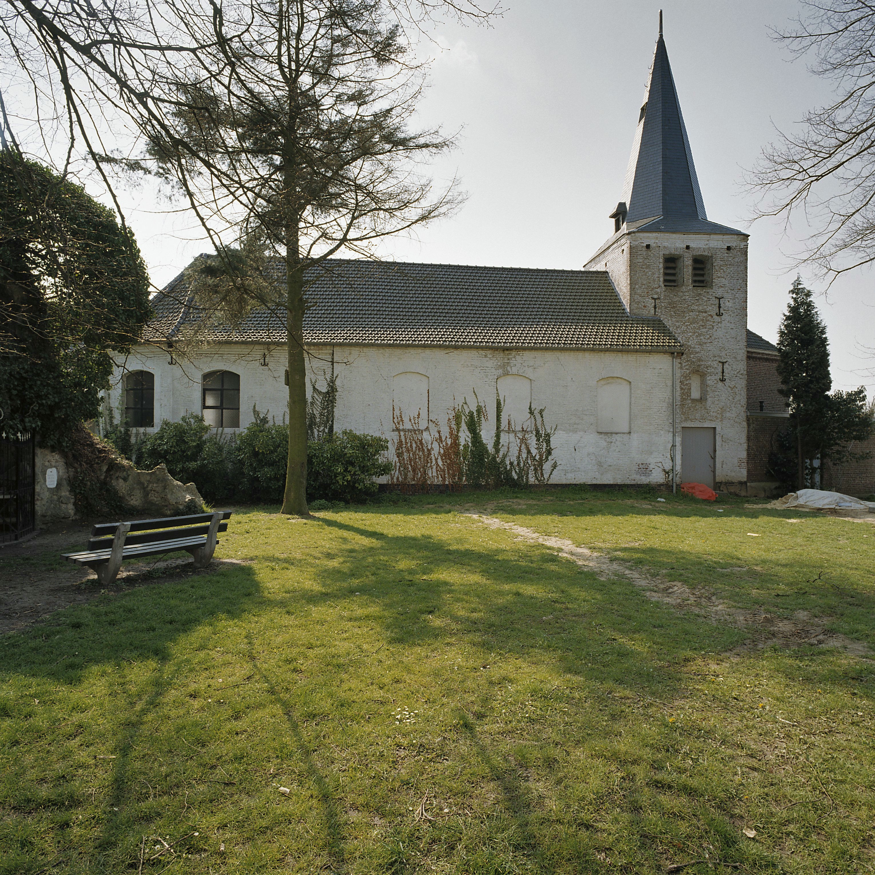 Voormalige Abdij Sint Benedictus En Sint Clemenskerk: Overzicht noordgevel met kerktoren, oude parochiekerk